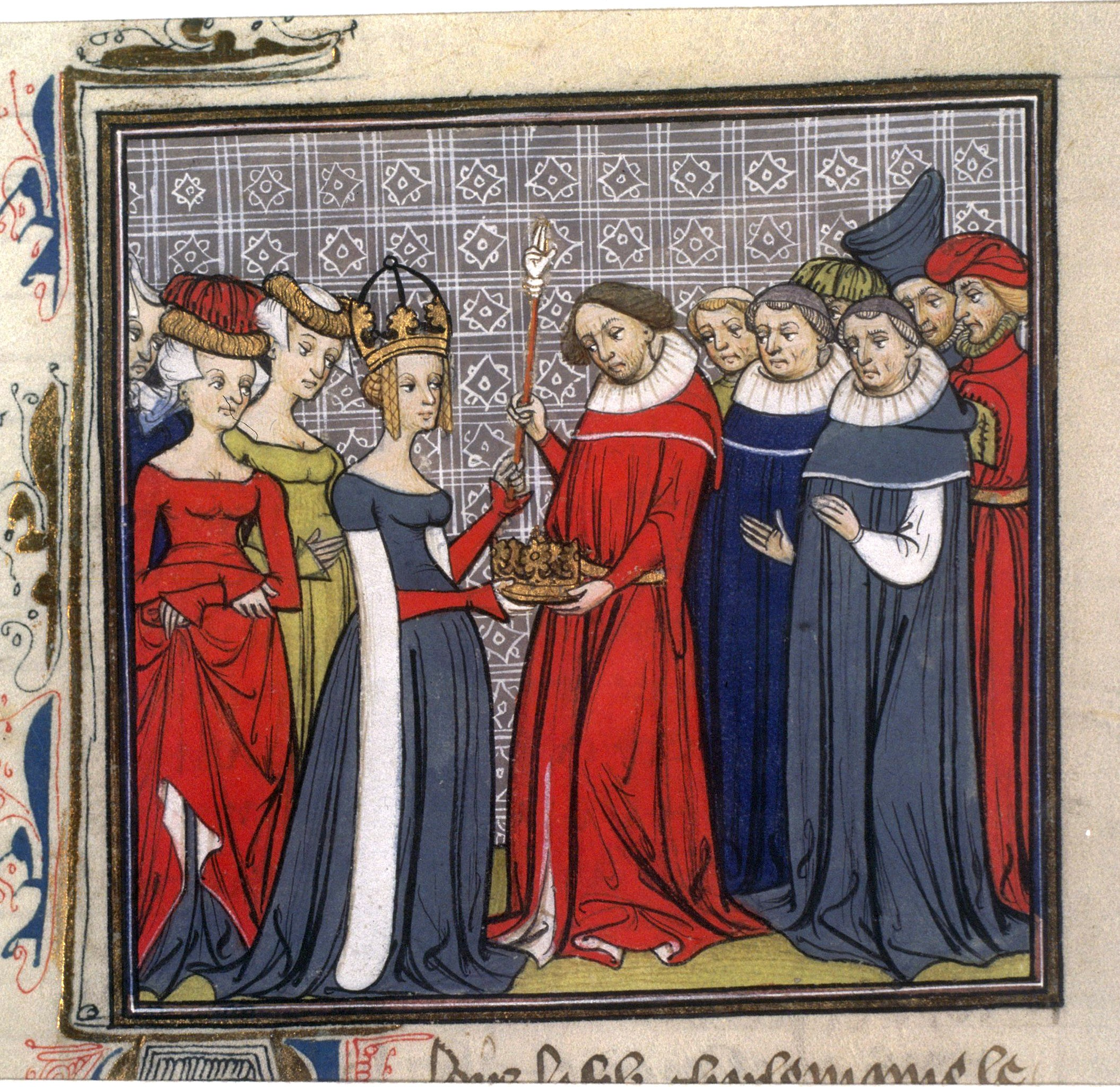 Louis II le Bègue recevant les Regalia. Enluminure tirée d'un manuscrit des Grandes Chroniques de France, XIVe-XVe siècle Bibliothèque nationale de France, Département des Manuscrits, Français 73, folio 163